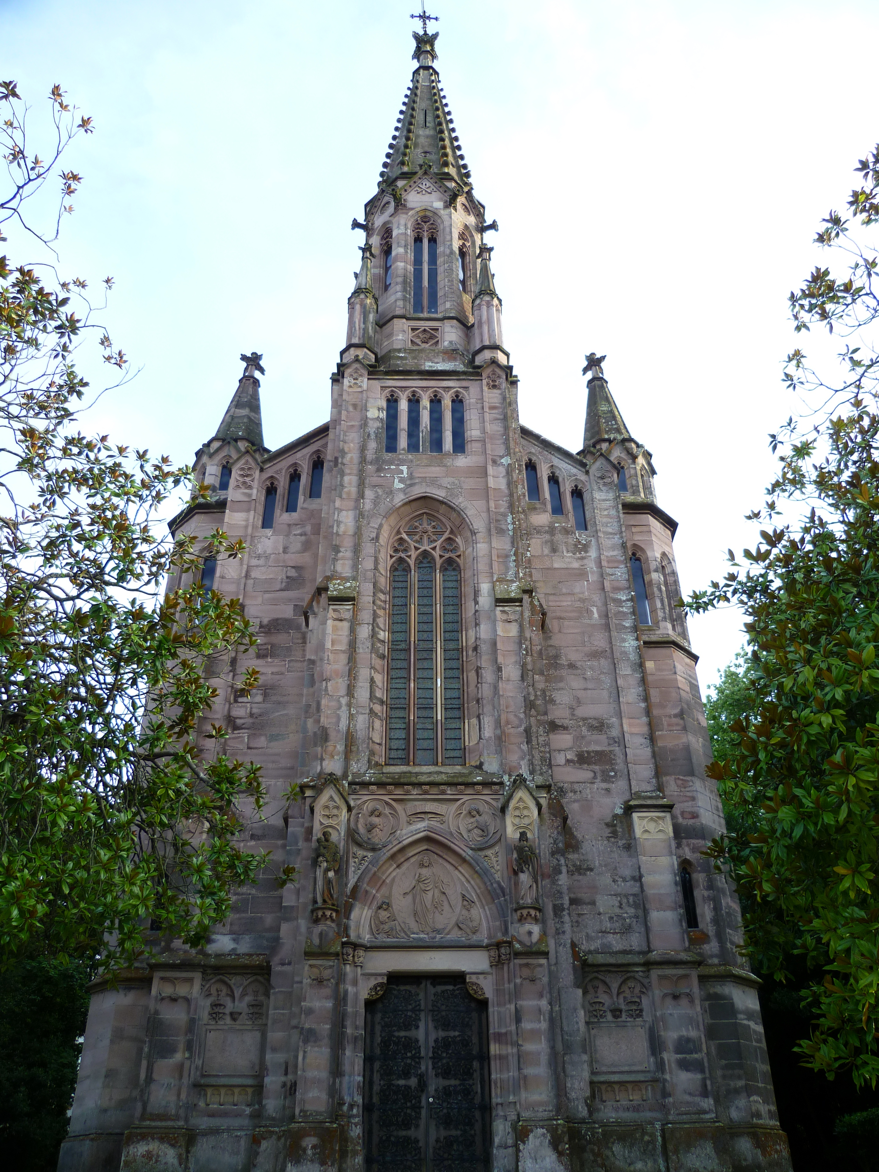 Capilla-Panteón del conjunto histórico del "Palacio de Sobrellano del Marques de Comillas, la capilla-panteón y su parque" situado en Comillas. Cantabria. España.